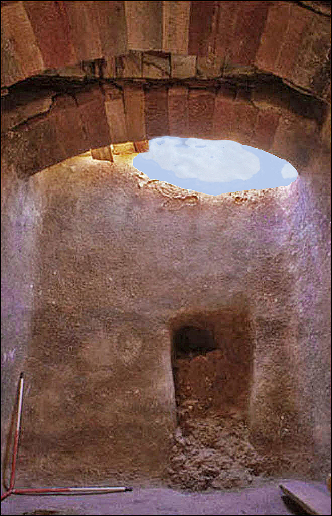 Pétra. Ez Zantur IV. Intérieur d'une citernes creusée dans la roche.